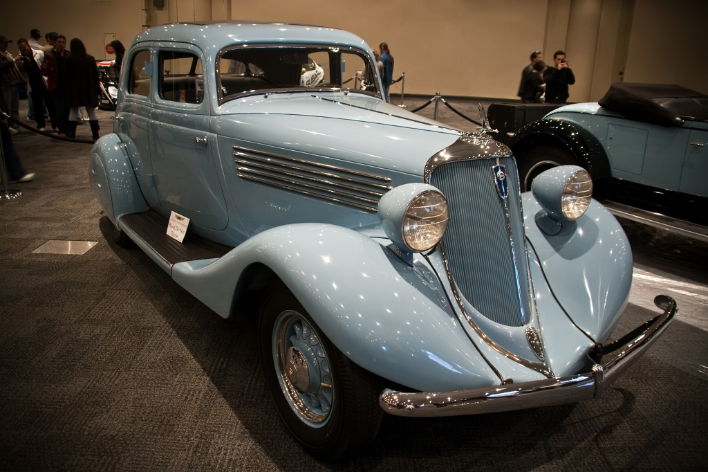 1934 Studebaker Commander Land Cruiser Sedan